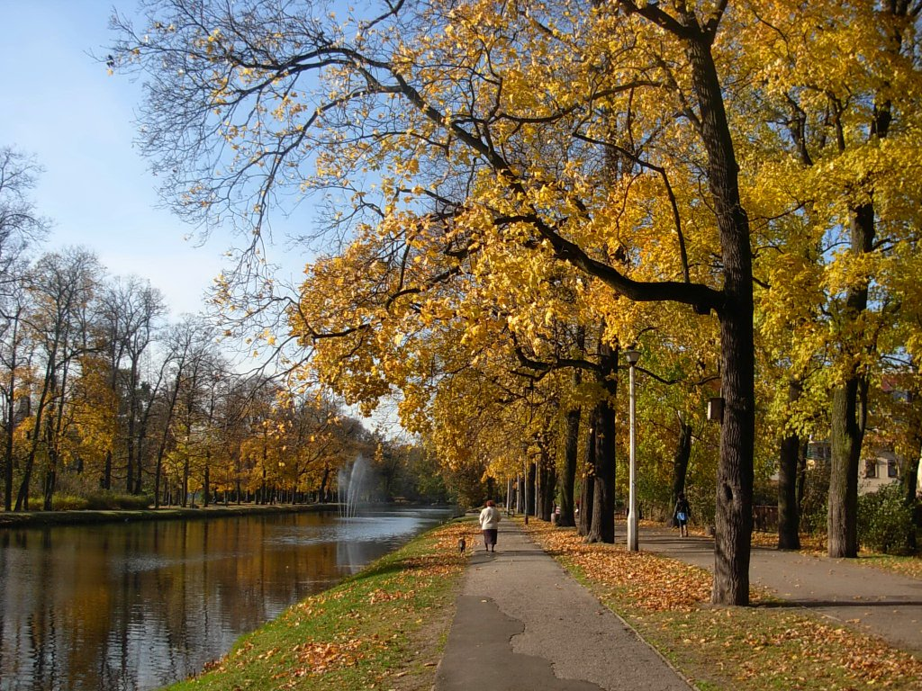 Planty nad Kanałem Bydgoskim